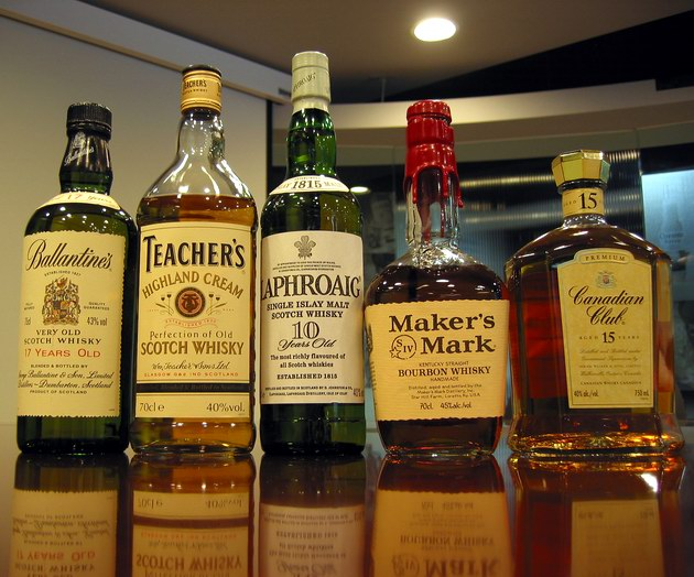 數種主流的威士忌款式 威士忌種類繁多，除了產地有差外風格也各有不同，圖中所見為幾種種類不同的威士忌，由左至右分別為兩種蘇格蘭調和式威士忌，蘇格蘭單一麥芽威士忌，美國zh:波本威士忌與zh:加拿大威士忌。 本圖片由上傳者zh:User:SElephant拍攝於2004年7月。